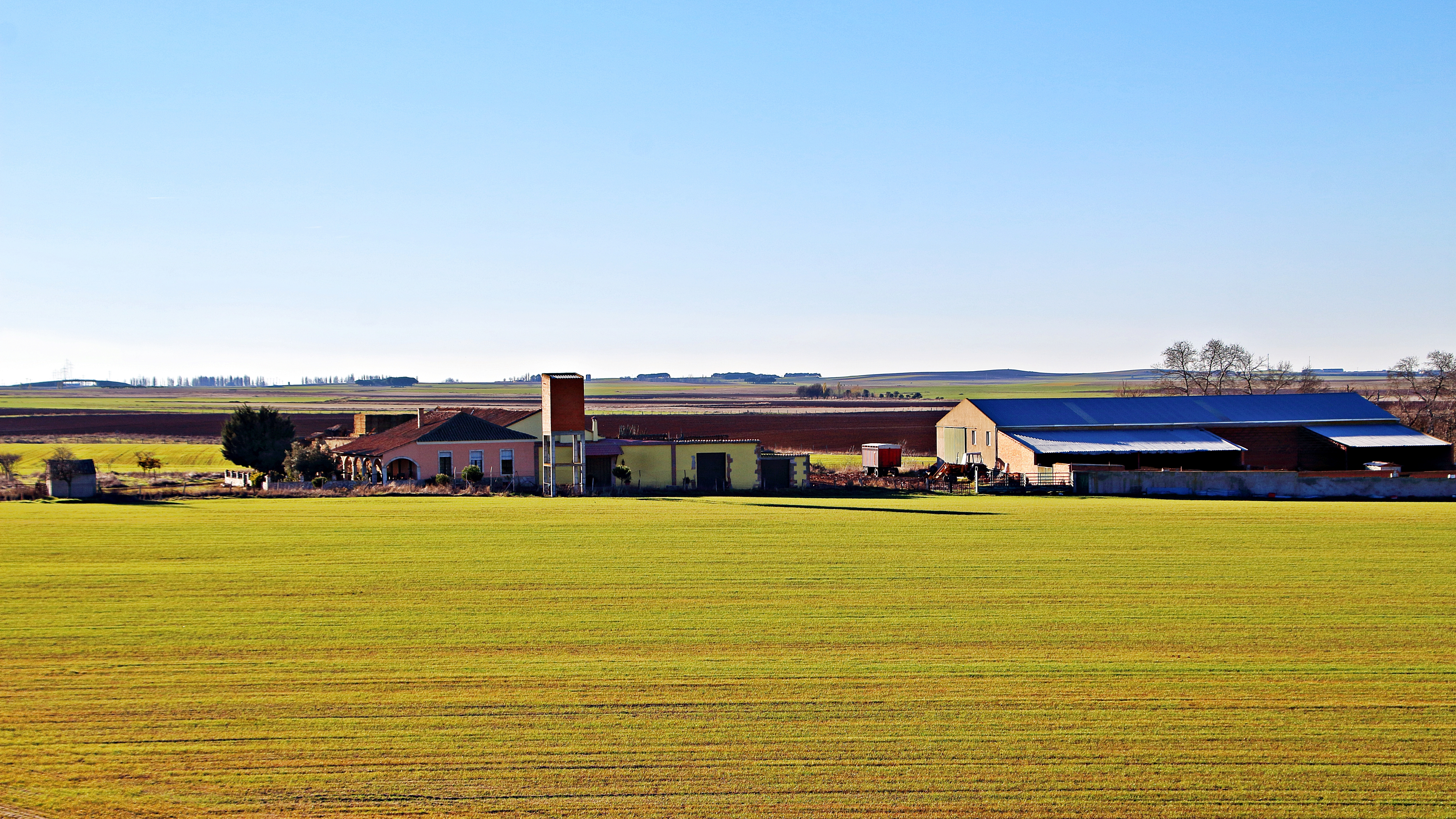 La Ventosa despoblado del municipio El Pedroso de La Armuña, comarca de La Armuña, provincia de Salamanca.